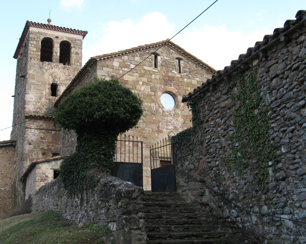 Roman Church: Sant_Pere_Despuig (Val de Bianya (near Olot), Catalunya, Spain)